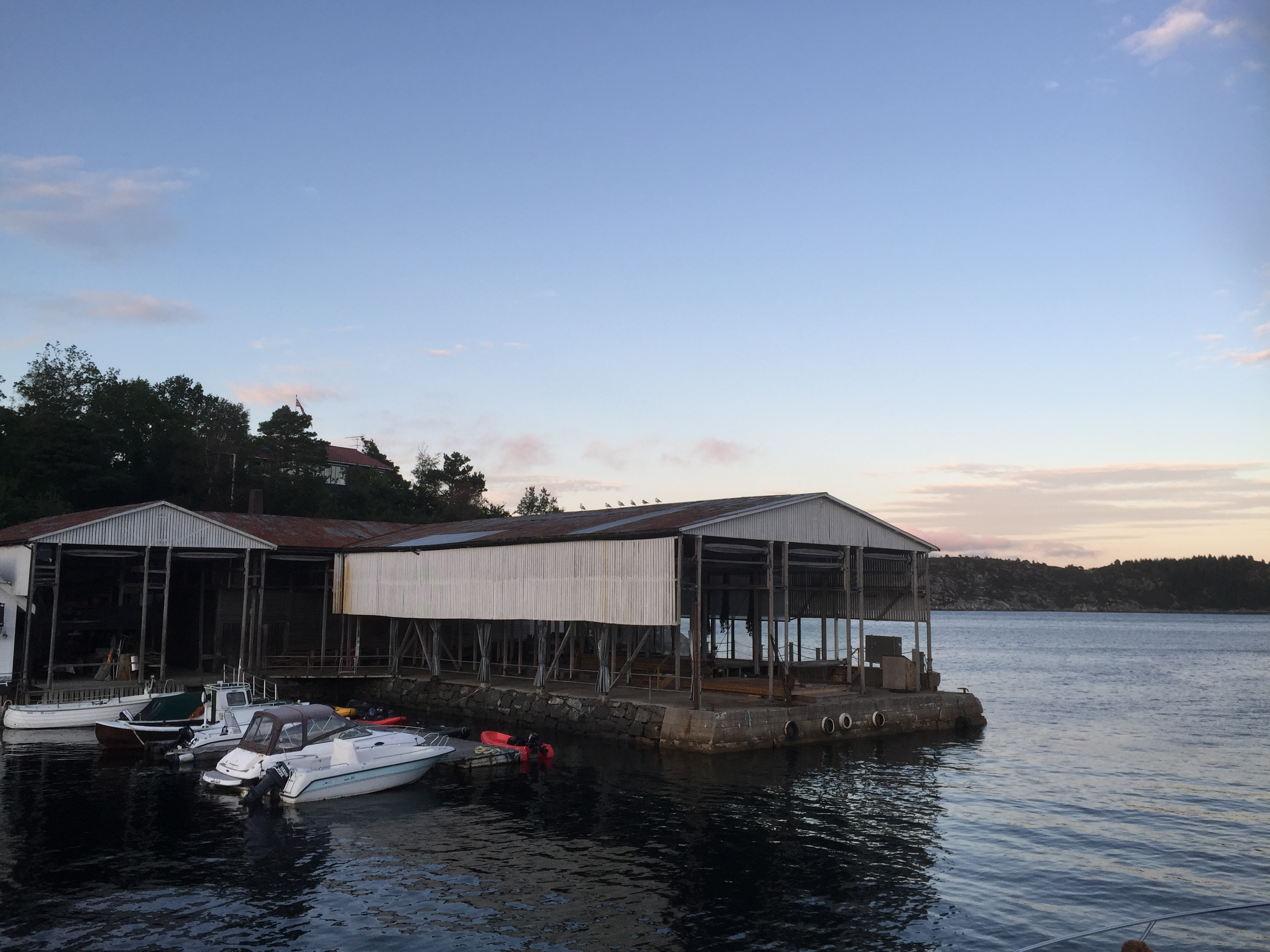 Nothengje på Bekkjarvik i Austevoll